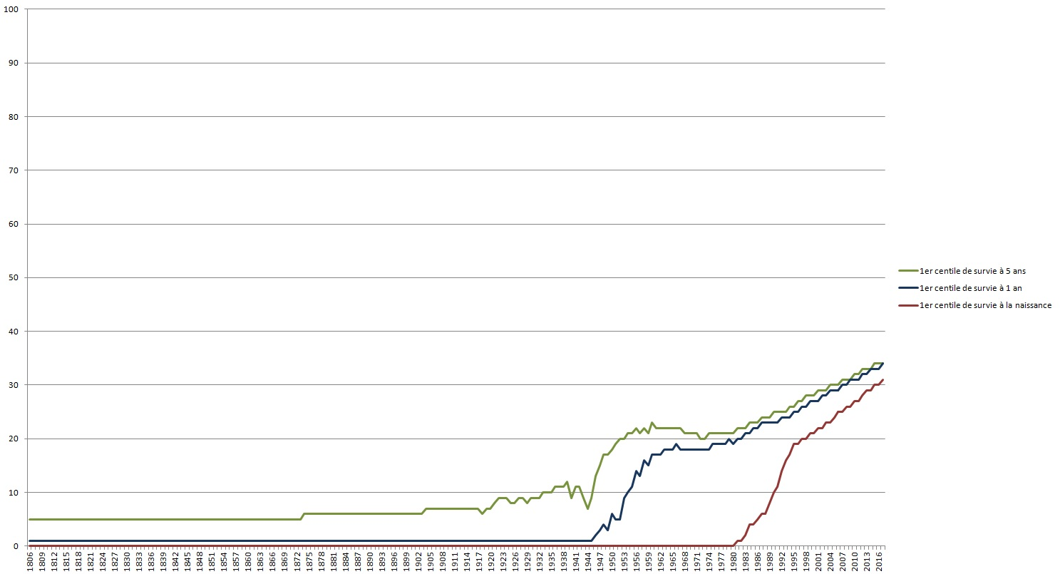 Premier centile de survie à la naissance: âge à partir duquel 1% de la population est morte. - Premier centile de survie à 1 an: âge à partir duquel 1% de la population de la population ayant survécu à leur 1er anniversaire est morte. - Premier centile de survie à 5 ans: âge à partir duquel 1% de la population de la population ayant survécu à leur 5ème anniversaire est morte.